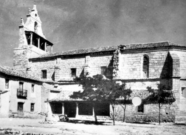 Iglesia parroquial de Santa María - Valverde de Campos (Valladolid) - Cuaderno. Álbum de Valladolid - Fotografía 60 x 42 B/N